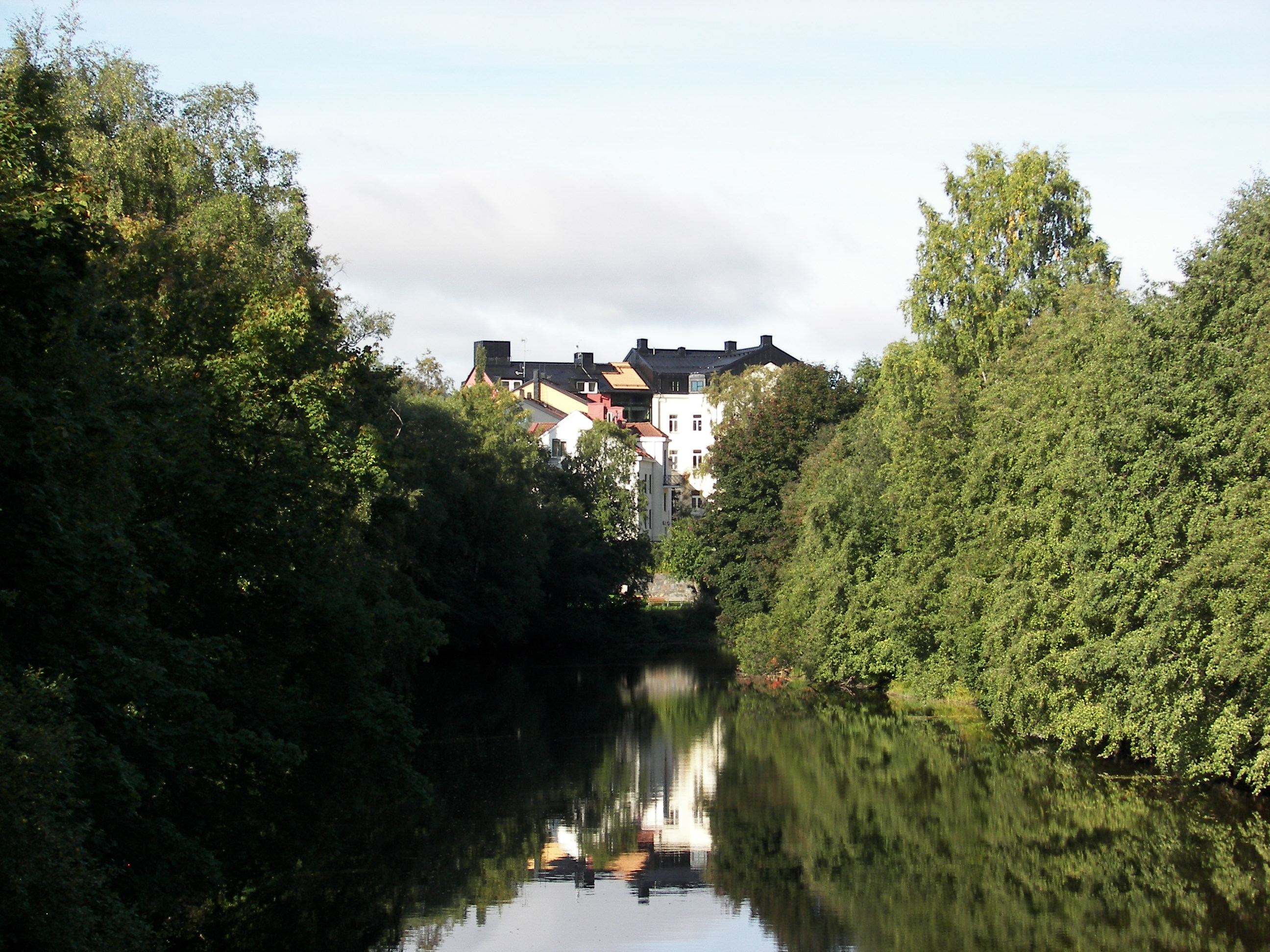 Selångersån mot Åkroken (Mittuniversitetet) i Sundsvall, sett från Sporthallsbron med Åparken till höger om ån.